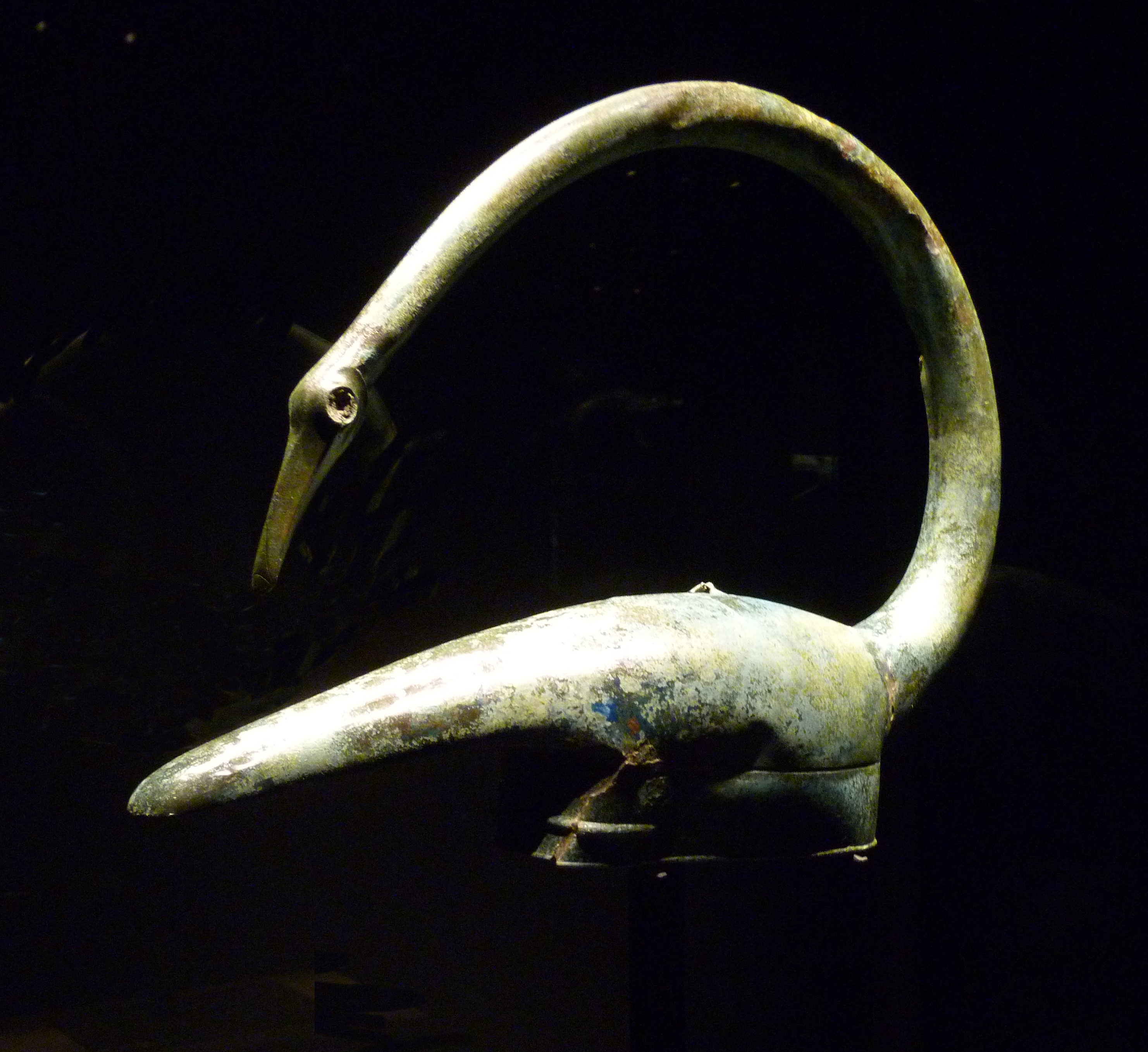 Casque en bronze décoré d'une forme de cygne (entre le IVe et le IIe s.av.J.C.). Découvert en 2004 dans un dépôt d'objets en bronze sur le site de Tintignac à Naves (Corrèze, France). Conservé au musée de Naves. Photo lors de son prêt pour l'exposition Les Gaulois : une exposition renversante à Paris, Cité des sciences de la Vilette, 2011.